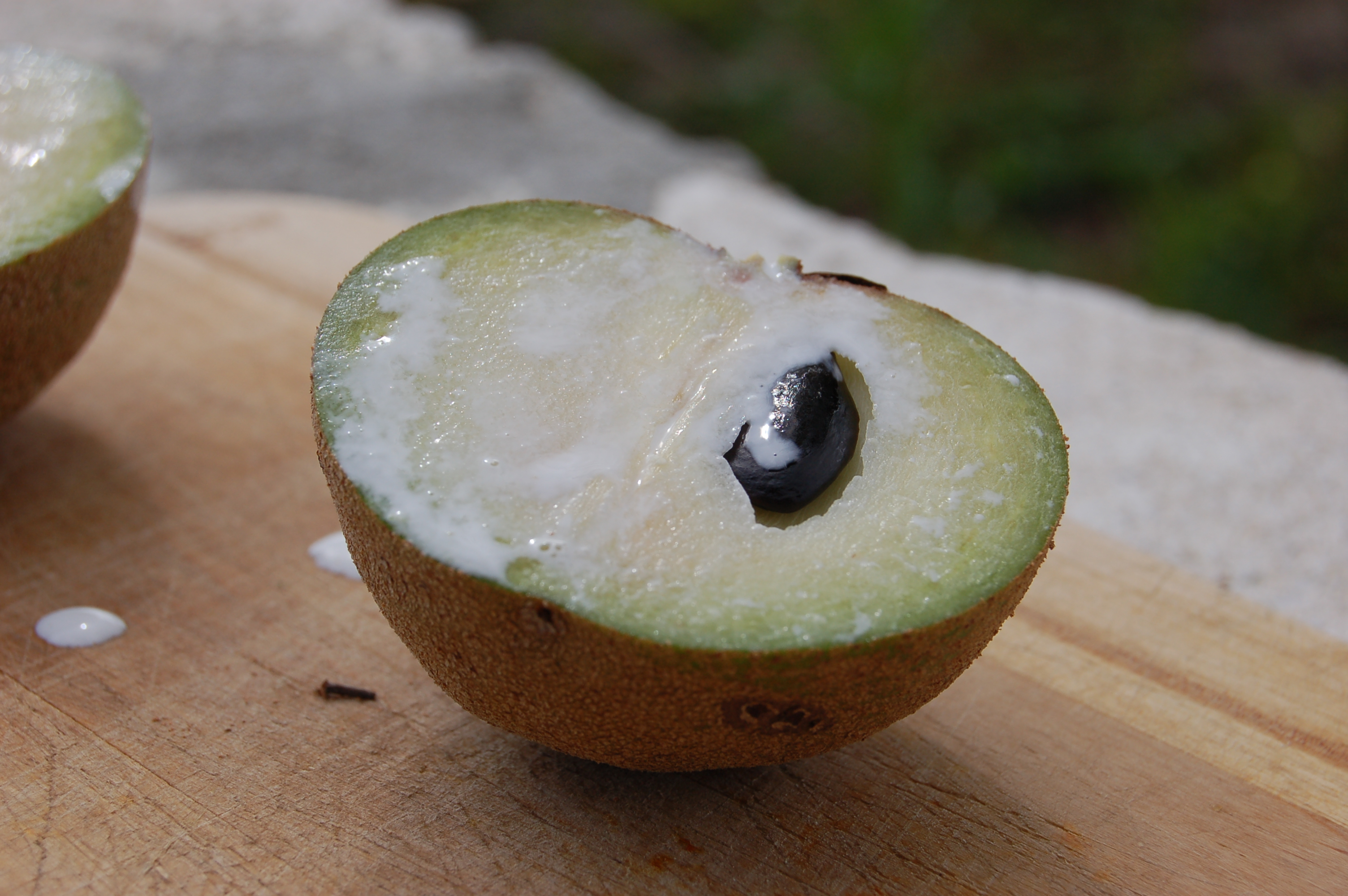 Unripened Sapodilla (Manilkara zapota) fruit. Image taken by myself.